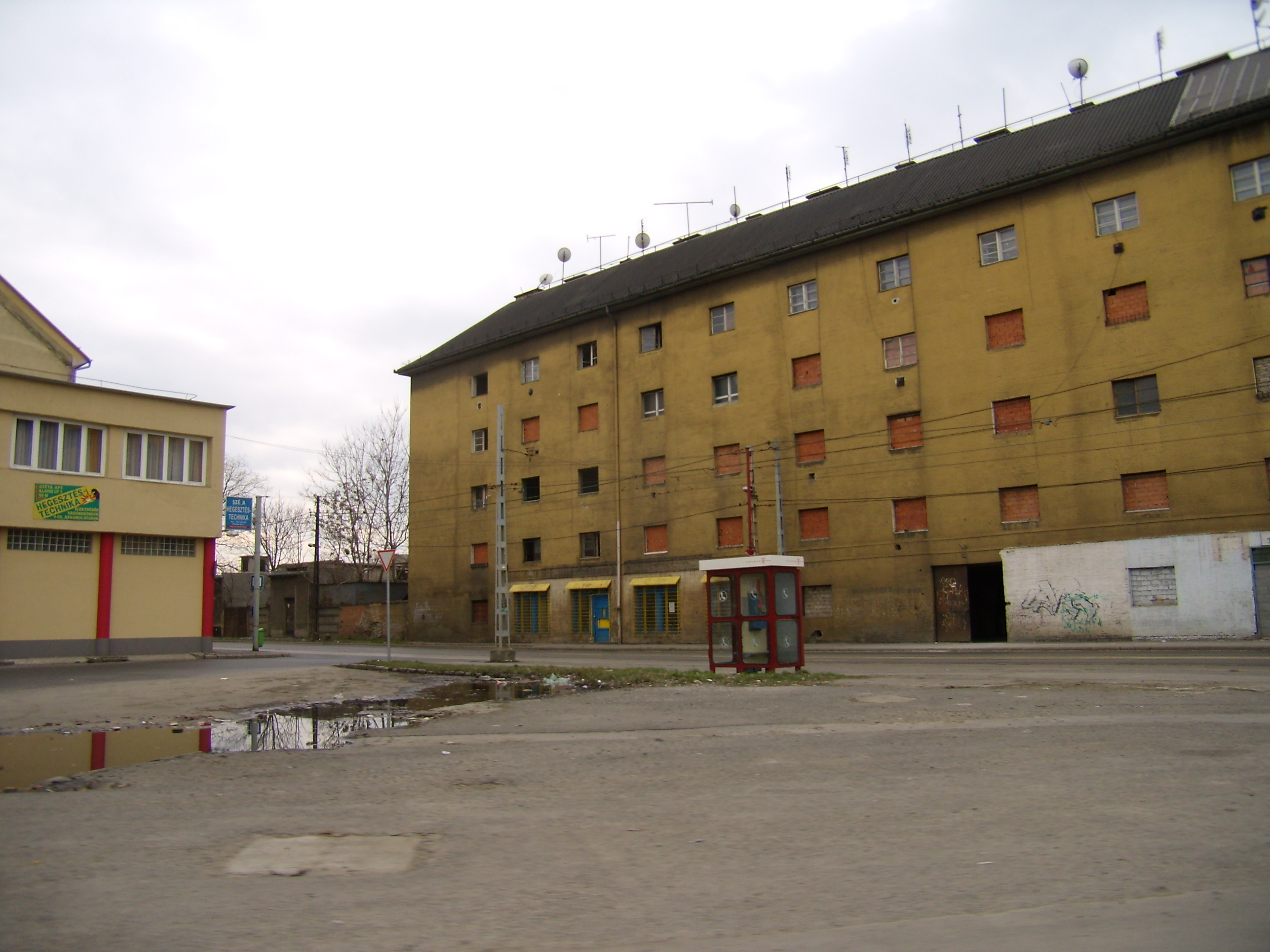 A Dzsumbuj fénykorában, egykori szükséglakás-telep Budapest IX. kerületében, az Illatos út és a Gubacsi út sarkánál